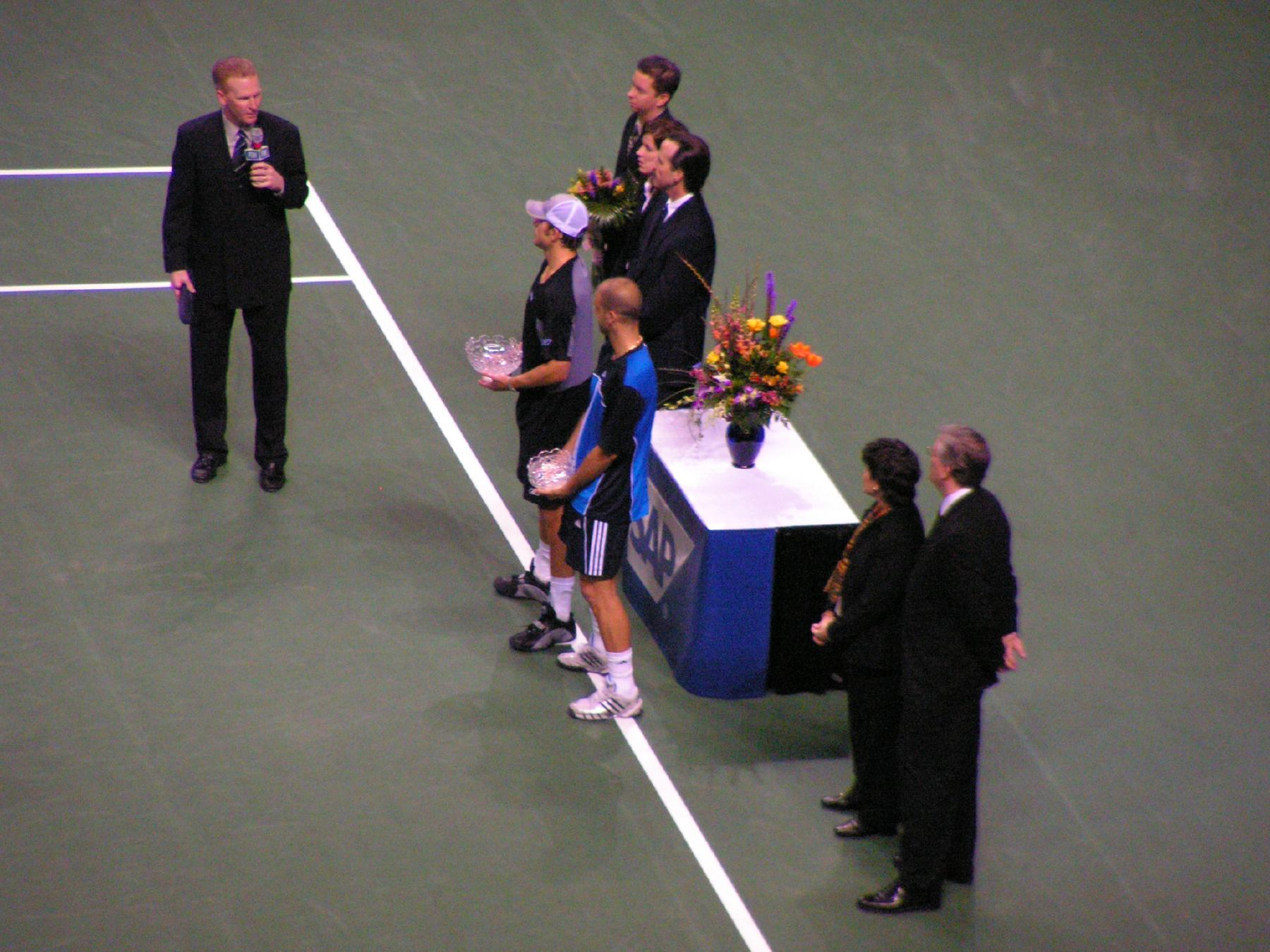 Ceremony at finish of play.